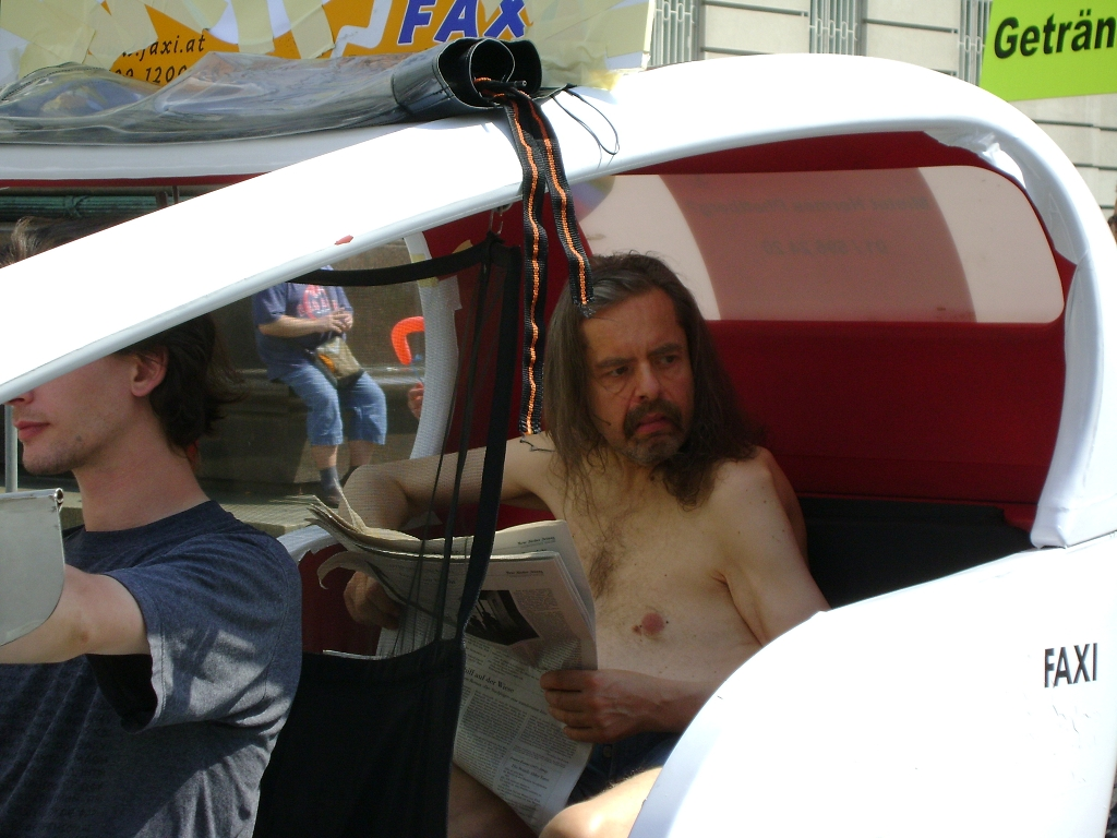 Hermes Phettberg im Faxi (Fahrradtaxi)